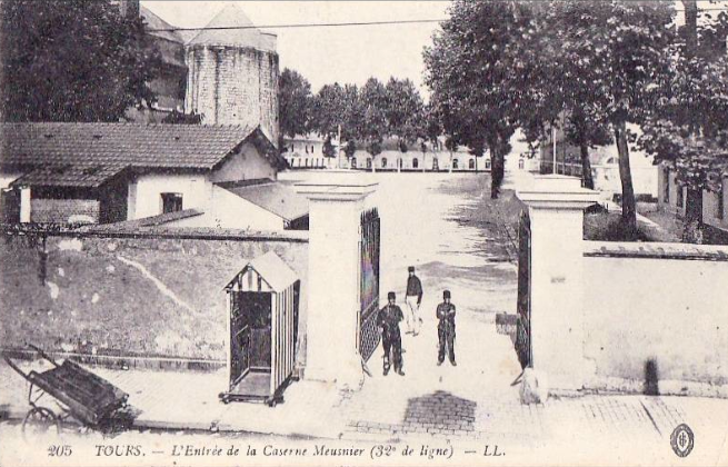 Entrée de la caserne Meusnier, rue Lavoisier (anc. Saint-Maurice) à Tours. Vue sur le château (tour du cachot) et les dépendances de la casernes